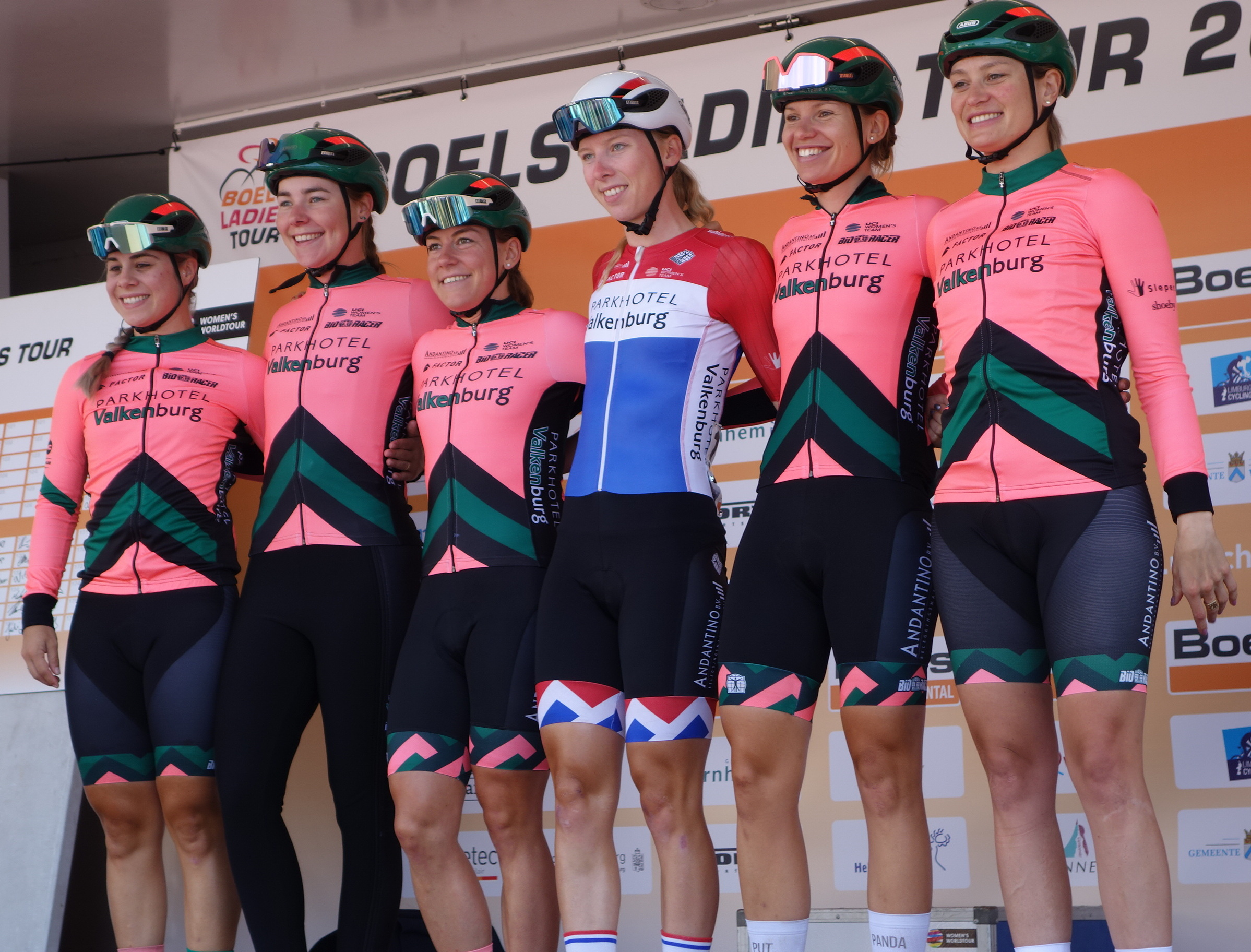 Parkhotel Valkenburg bij de start van de eerste etappe van Stramproy naar Weert in de Boels Ladies Tour 2019